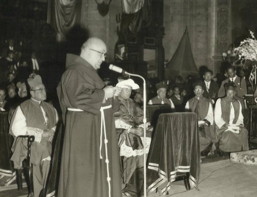 Nel Congresso di Santo Domino